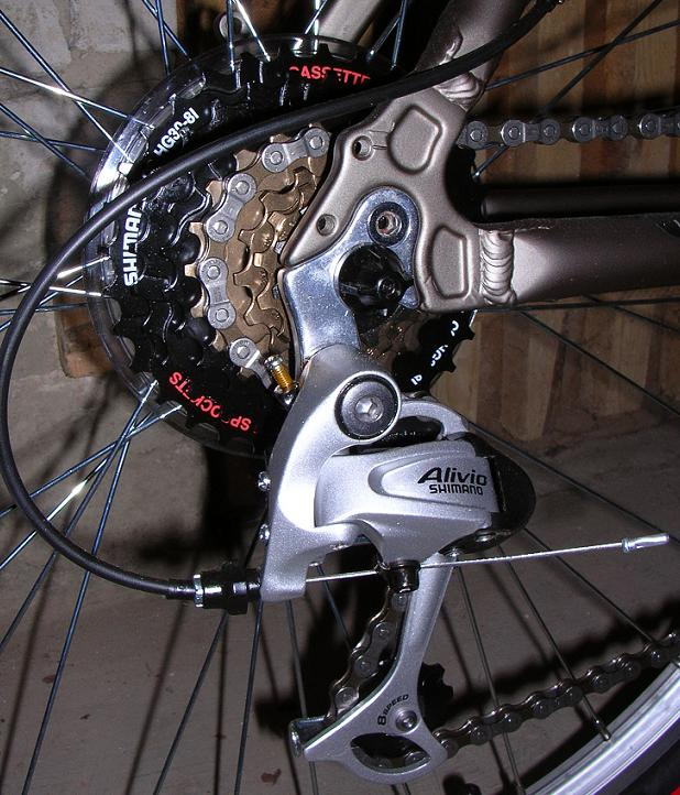 Przerzutka rowerowa